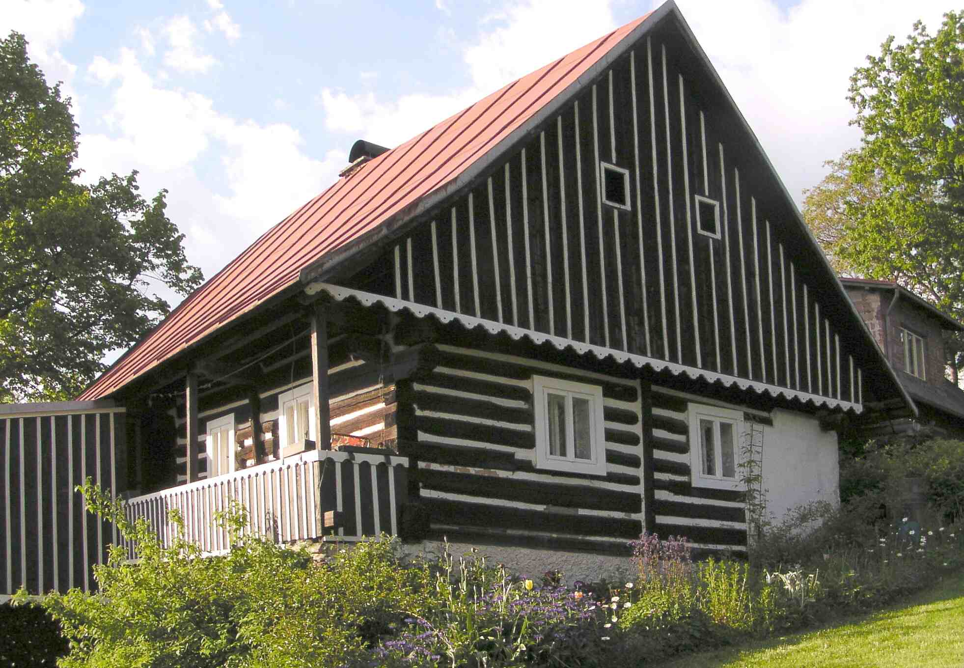 Na této dřevěnce můžeme vidět velmi zachovalou pavlač, v podkrkonoší se nazývala forhaus